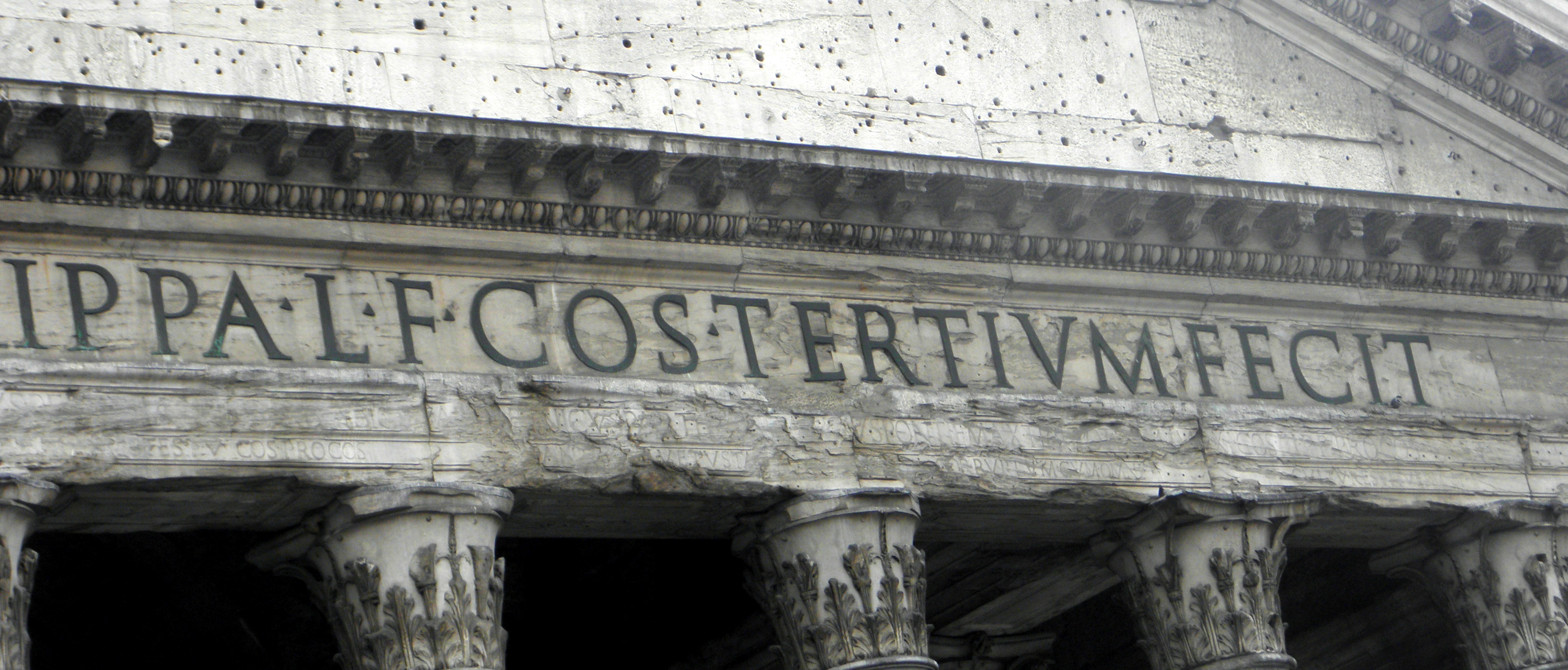 Напис на фронтоні (фрагмент)